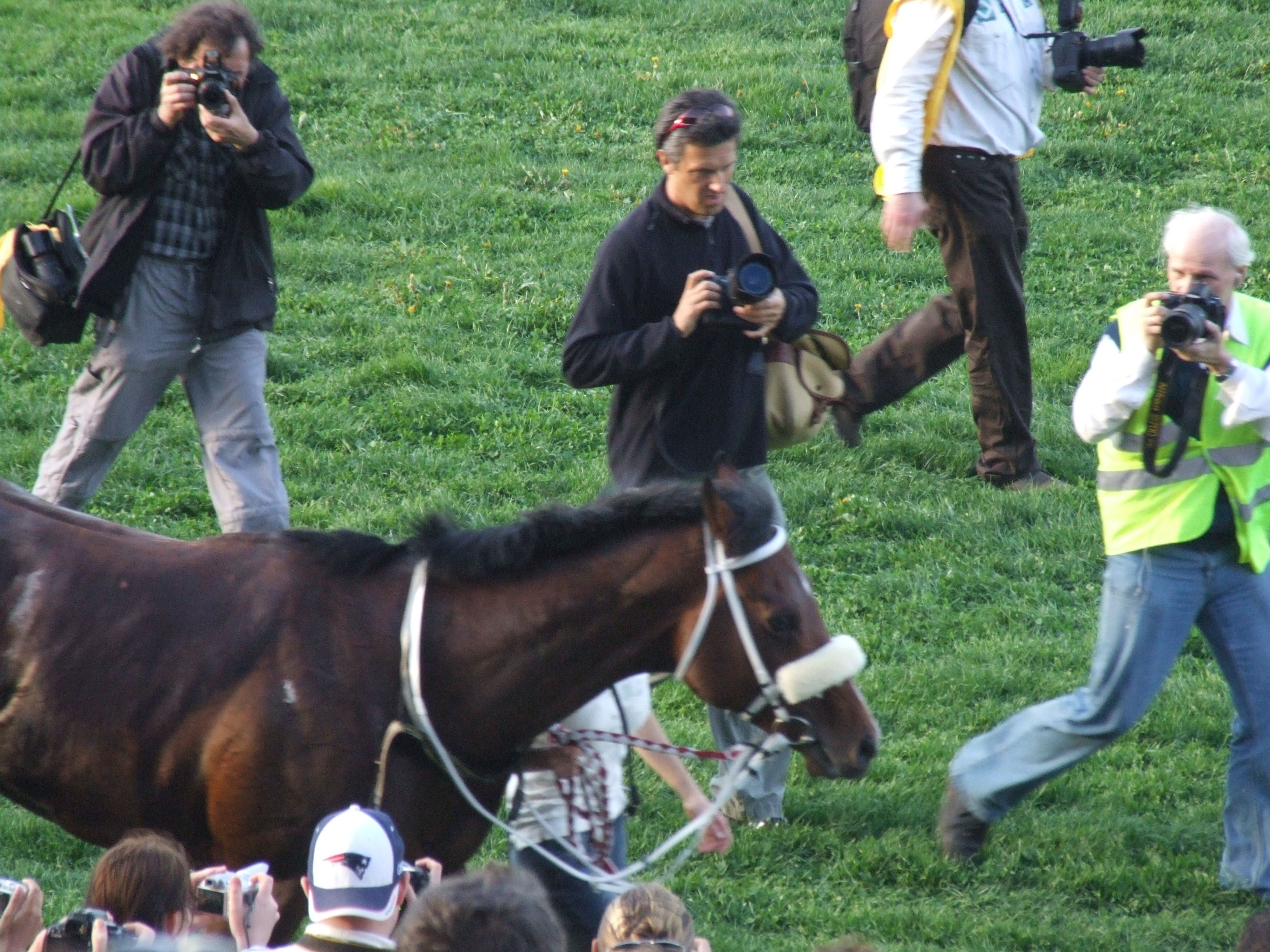 Overdose a fotósok között (köztük Burger Barna) a Kincsem Parkban, az OTP Hungária Nagydíjon